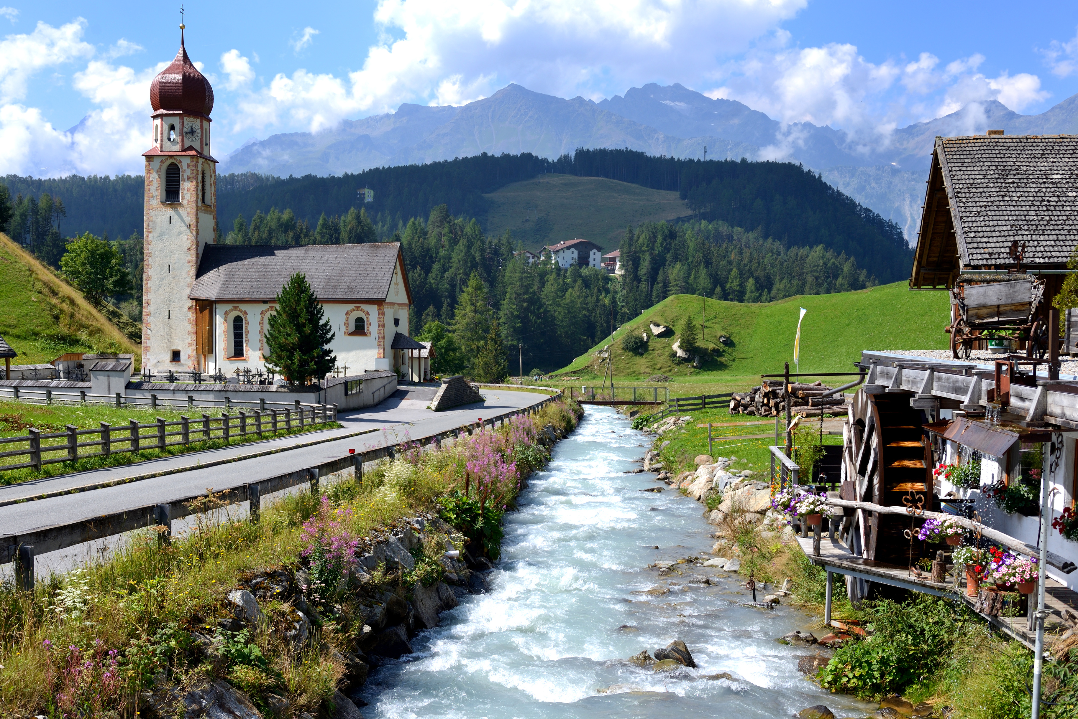 Horlachbach in Niederthai